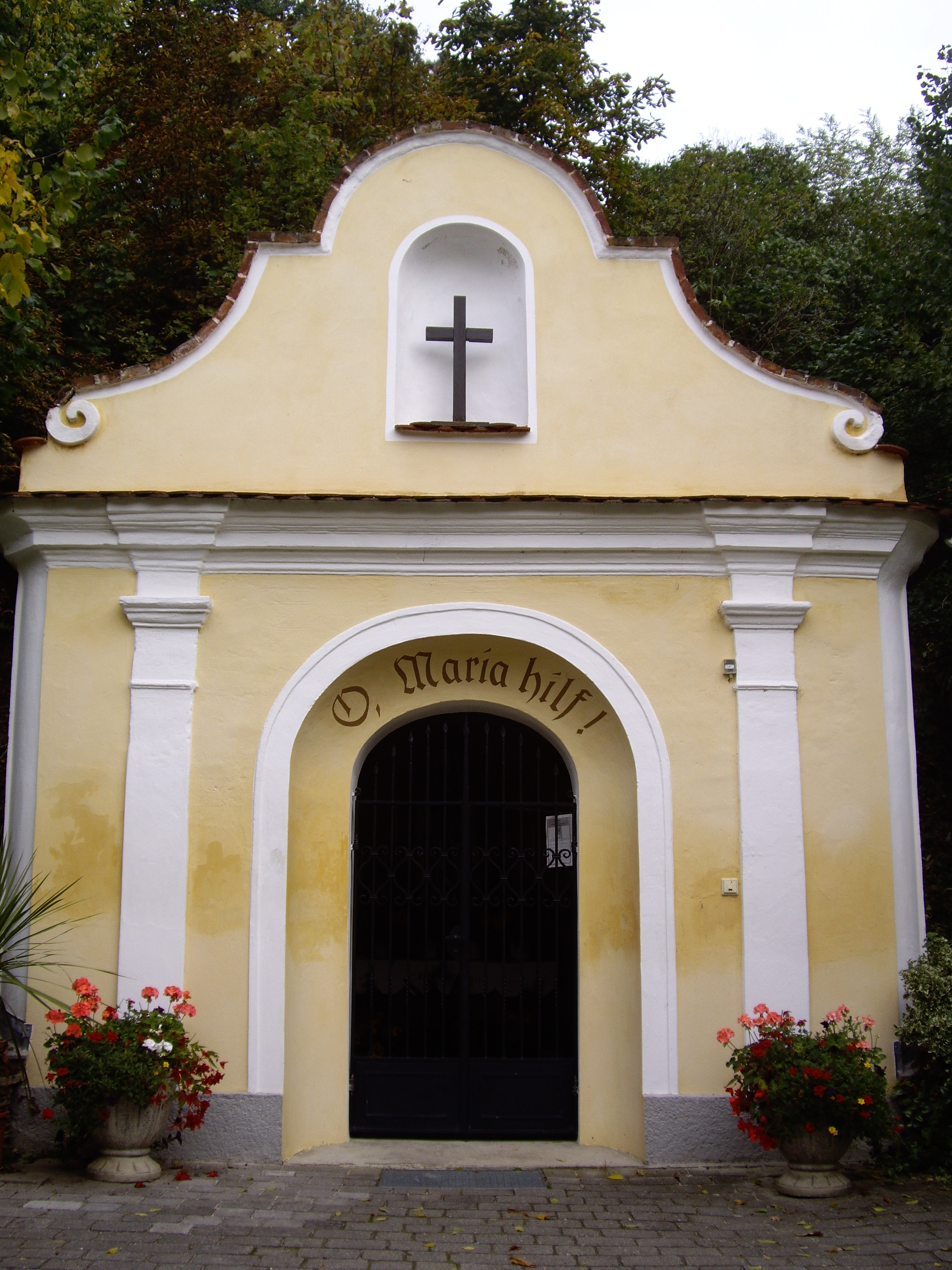 La kapelo en la kastelo Atzenbrugg, Malsupra Aŭstrio